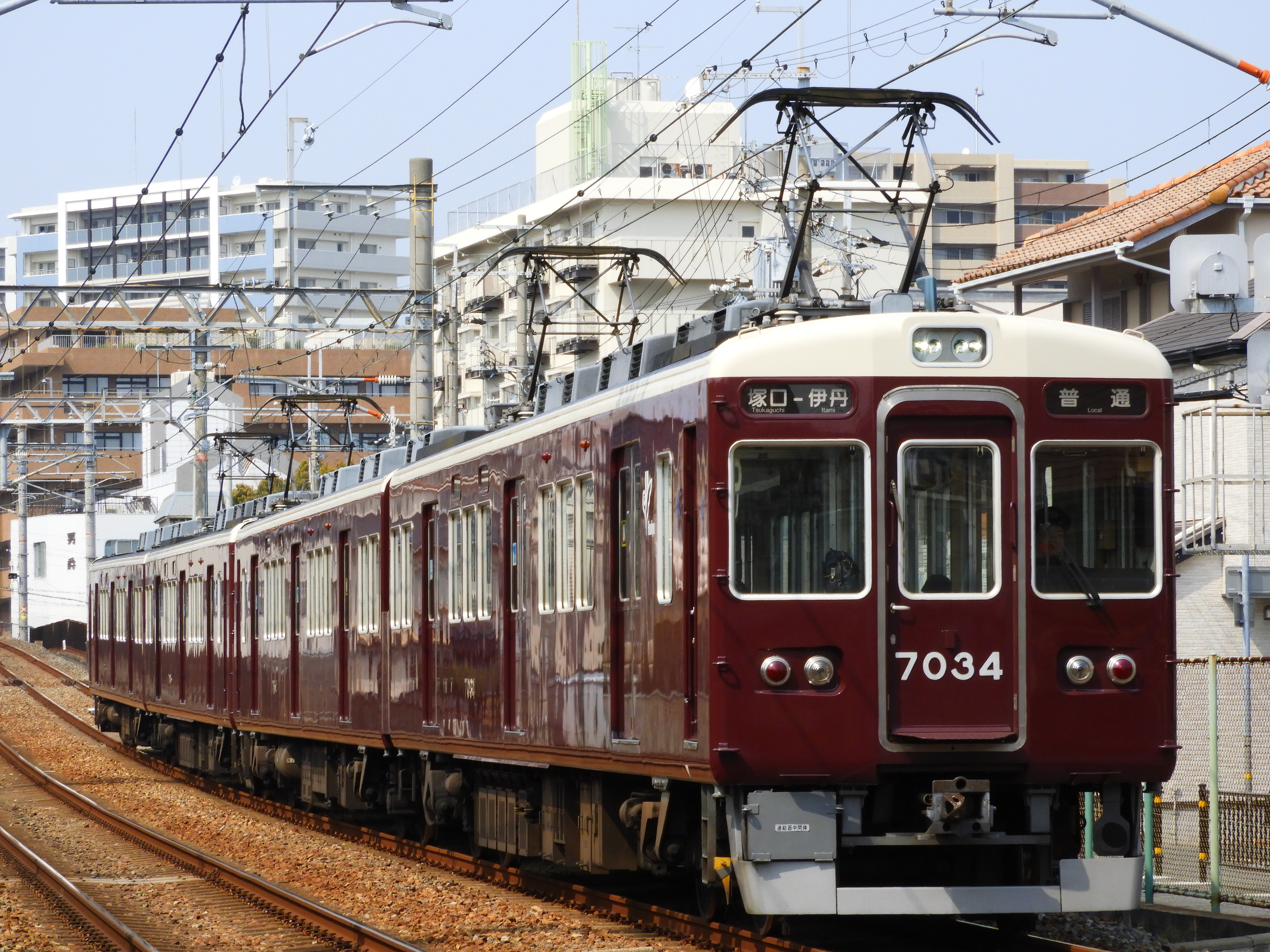 阪急伊丹線を走行する7000系(7034F)